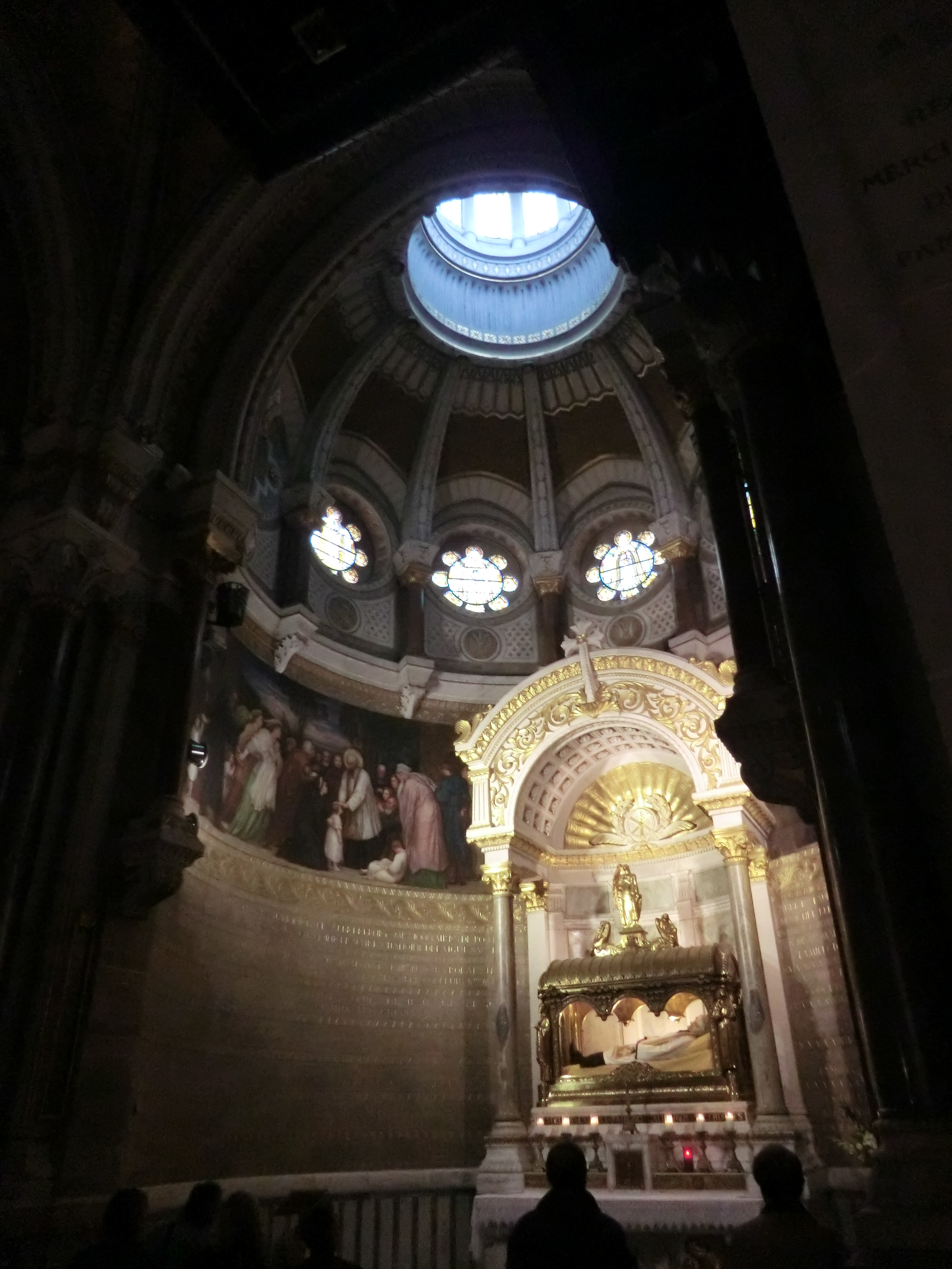 Basilique d'Ars. .